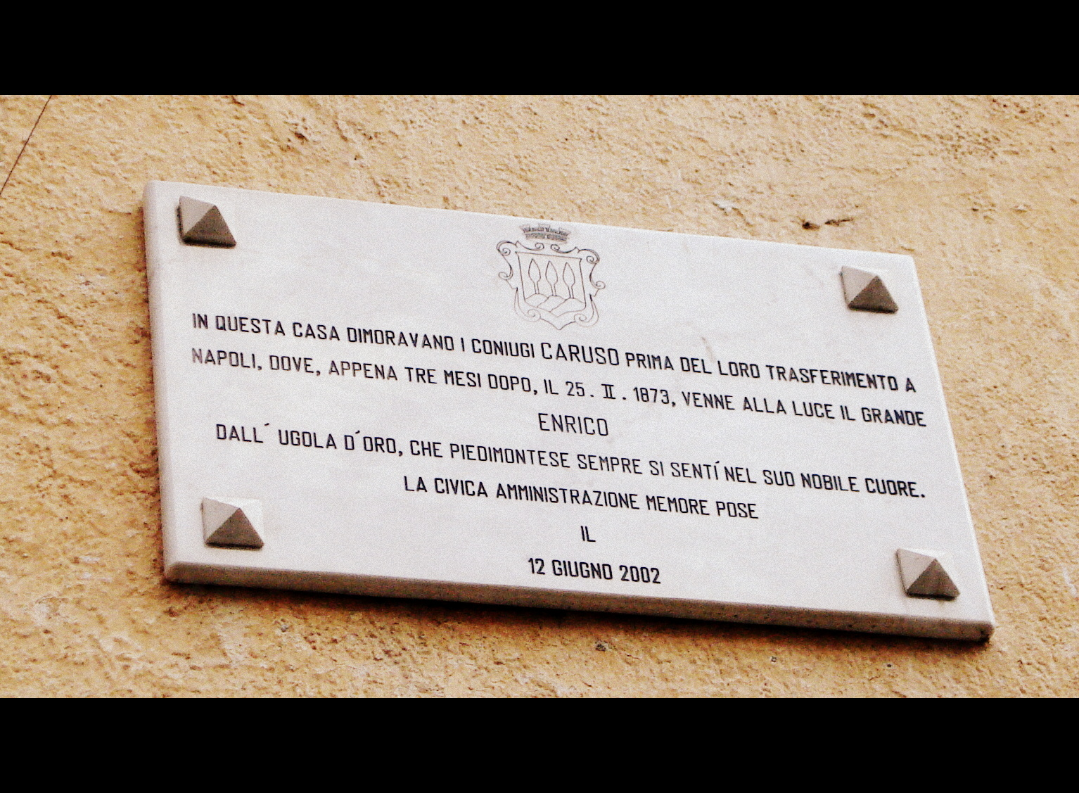 Piedimonte Matese: la lapide posta a memoria dell'abitazione dei genitori di Enrico Caruso.